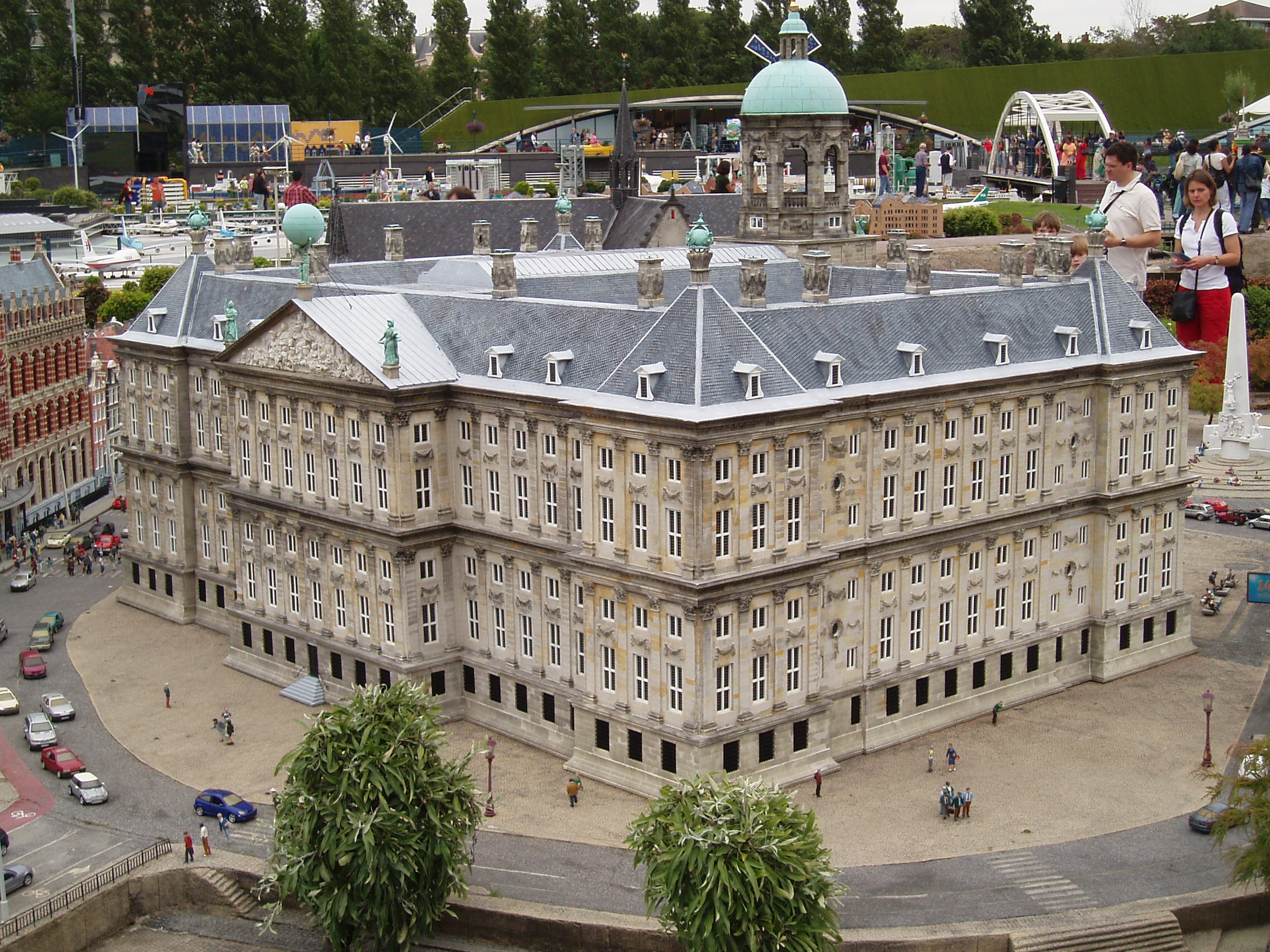 Madurodam in the Hague in the Netherlands; Paleis op de Dam in Amsterdam / Royal Palace Amsterdam